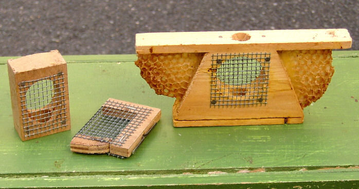 Königinnenzusetzkäfige